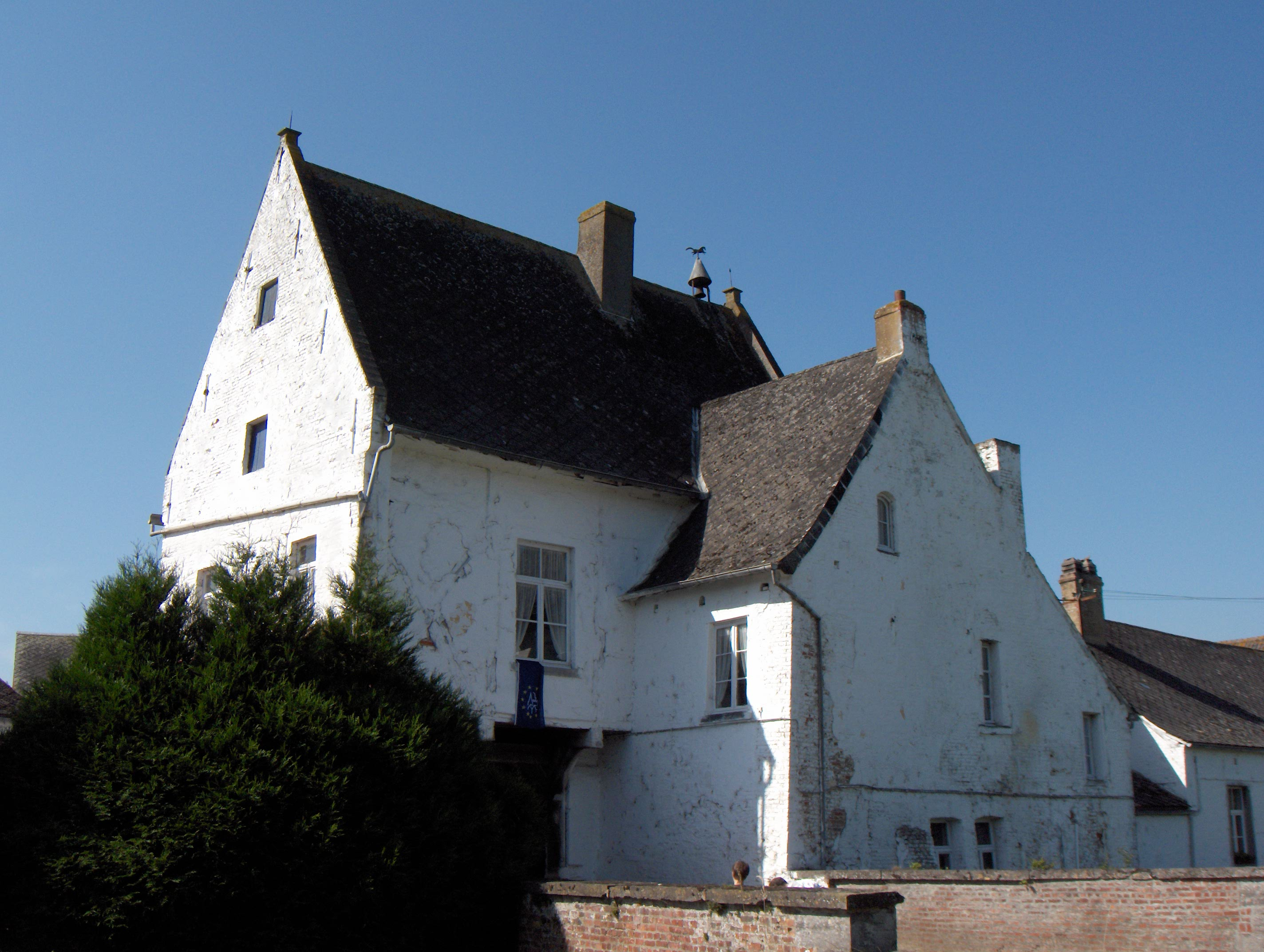 Steenkerque, Ortsteil der Gemeinde Braine-le-Comte, Prov. Hennegau (Belgien), Gutshof "Ferme de l'Hosté" an der Rue de l'Hôtel, Herrengebäude mit Eingangstor, 16. Jh.